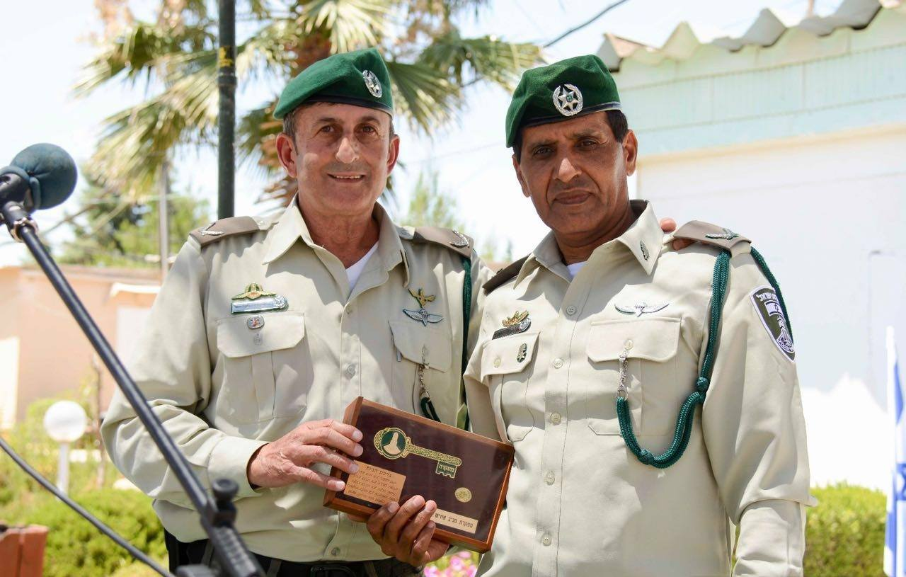 יזהר פלד ועוזי לוי